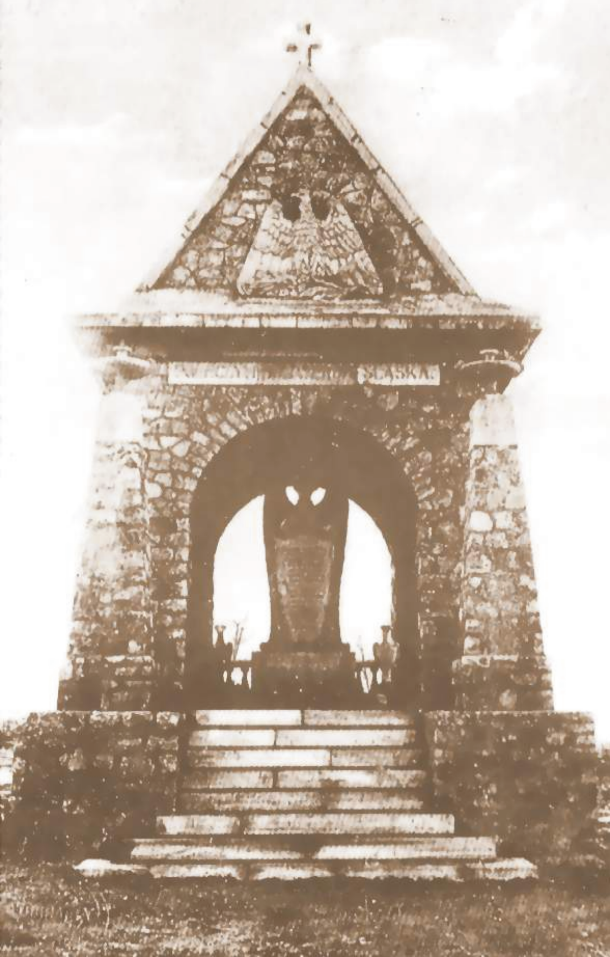 Pomnik Powstańców Górnego Śląska na Cmentarzu Wielowyznaniowym w Sosnowcu Rudnej zniszczony częściowo podczas II wojny światowej; po wojnie zbudowano nad nim kaplicę p.w. Wszystkich Świętych dla parafii św. Józefa Rzemieślnika (pocztówka wydawnictwa J. Diepel Sosnowiec nieznanej daty wykonania zdjęcia i wydania).